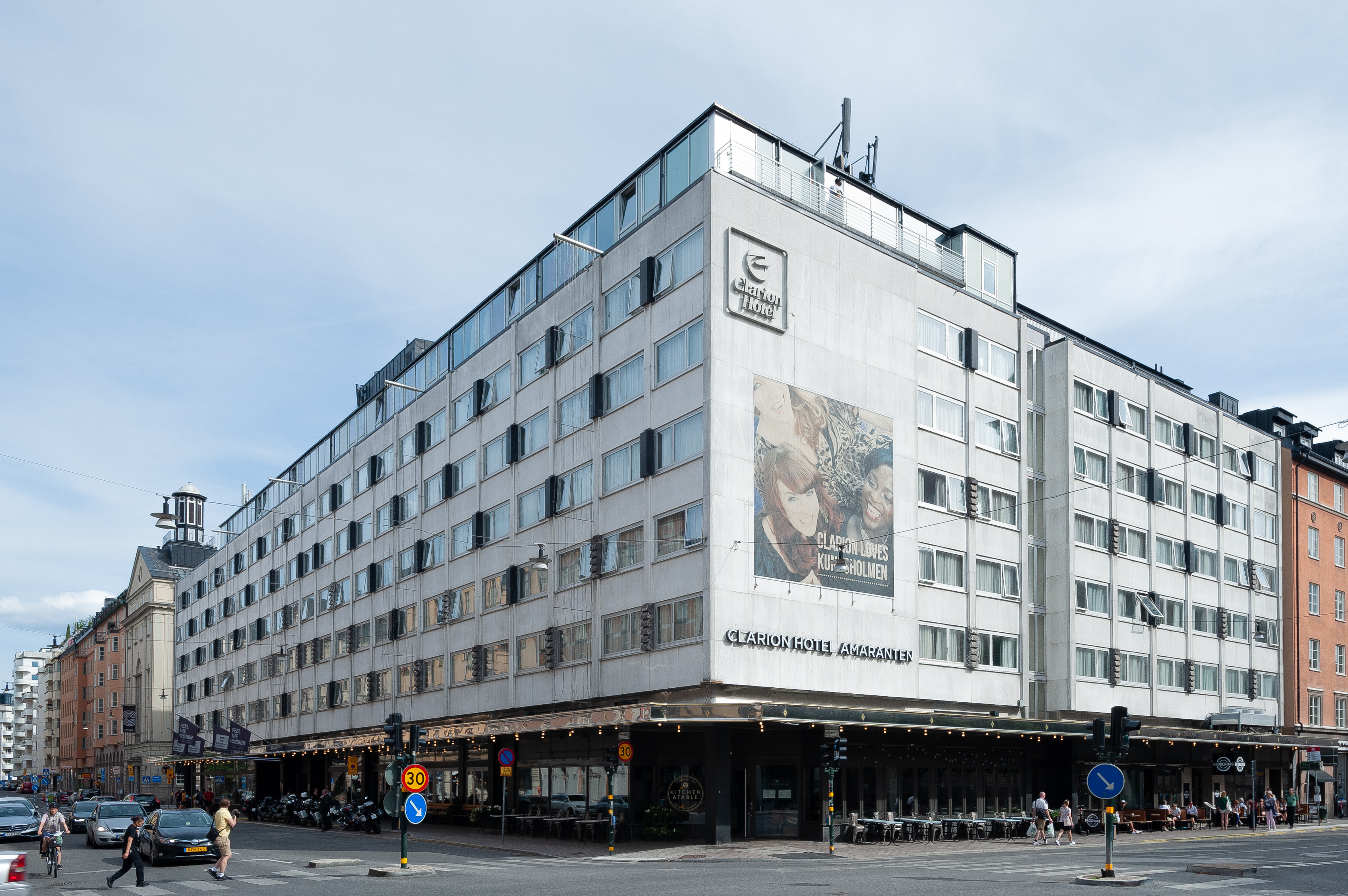 Hotell Amaranten, Kungsholmen, Stockholm.